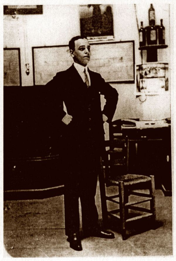 Juan Carandell Pericay, en su etapa de joven profesor en Cabra, hacia 1920